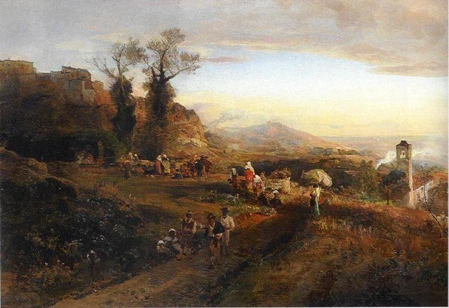 Montefiascone